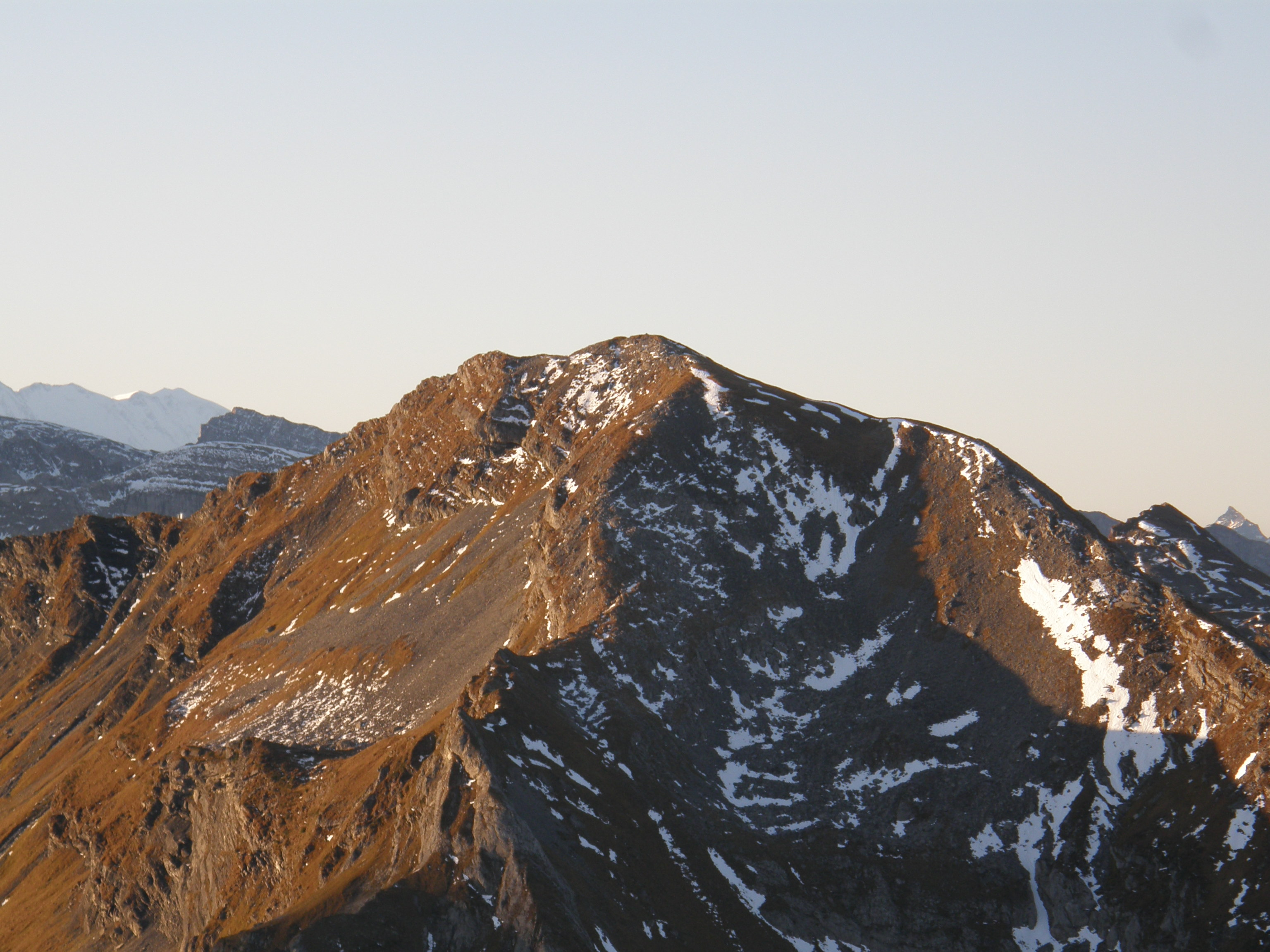 Vue depuis la Pointe de Chésery.